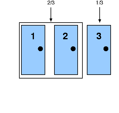 *Probabilité de tomber sur la voiture dans le problème de Monty Hall